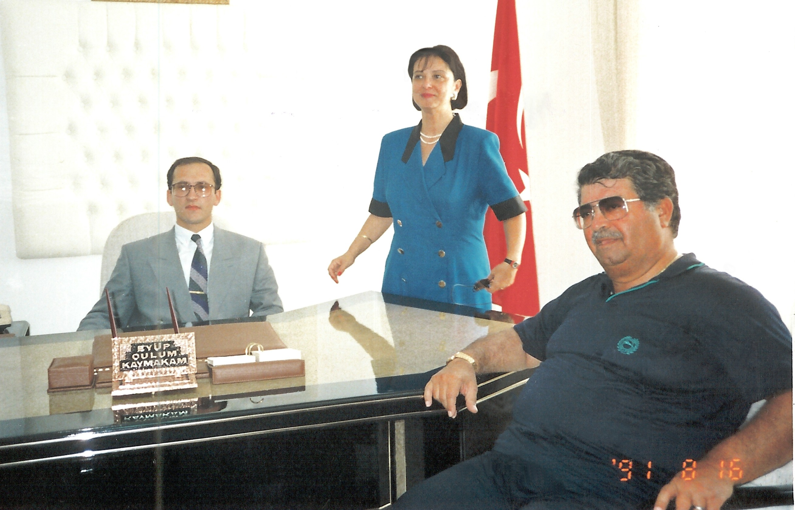 Özal inspecting a local governor. The ceremony marking of the beginning of governance for the first Kaymakam Eyüp Sabri Kartal in Kavaklıdere, with President Turgut Özal and Vali Lale Aytaman. Kaymakamlığı ziyaret eden Özal ve Kaymakam Eyüp Sabri Kartal'ın (16 Ağustos 1991) de ilk görevine başlama törenine iştiraki "sivil cumhurbaşkanından sivil yönetime destek" olarak değerlendirilmiştir. Özal, her zaman sivil yönetimi savunmuş ve halk tipi sivil kıyafetlerden hoşlanmıştır. Kamu kurum ve kuruluşlarını resmi kıyafetiyle ziyaret eden diğer Cumhurbaşkanlarından farklı olarak çoğu defa kravatsız, keten pantolon, keten ayakkabı ve tişörtle resmi programlara katılmıştır. Yukarıdaki resimde görüldüğü gibi üst rutbeli askerlerin devir teslim törenine katılmazken, küçük bir ilçede kaymakamın göreve başlama törenine katılmıştır. Askeri birlikleri şortla denetlemesi medya tarafından şiddetle eleştirilmiştir. Özal diğer Cumhurbaşkanları gibi konuklarını köşkte ağırlamak yerine, Marmaris Okluk koyundaki resmi yazlıkta ağırlamıştır. Ölümünde sivil cumhurbaşkanı, demokrat cumhurbaşkanı, dindar cumhurbaşkanı pankartlarıyla da bu tutumu desteklenmiştir.